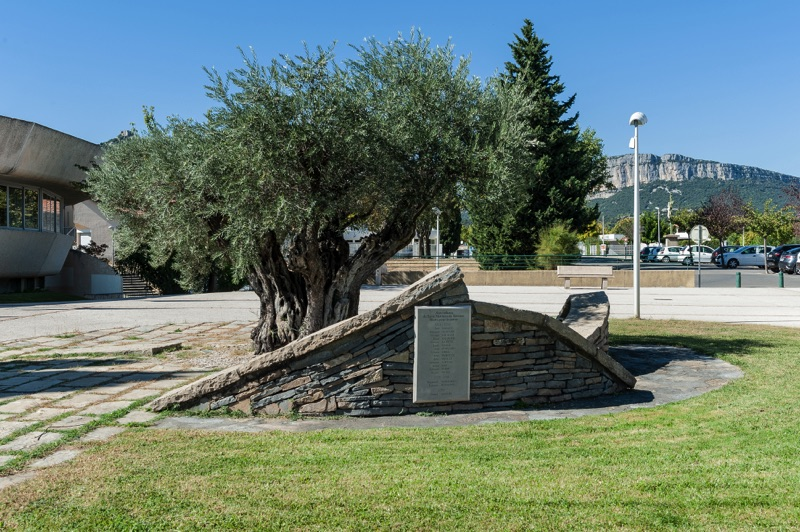 Monument aux morts - Archives départementales de l’Hérault - FRAD034-2637W-Saint-Mathieu-de-Treviers-00002